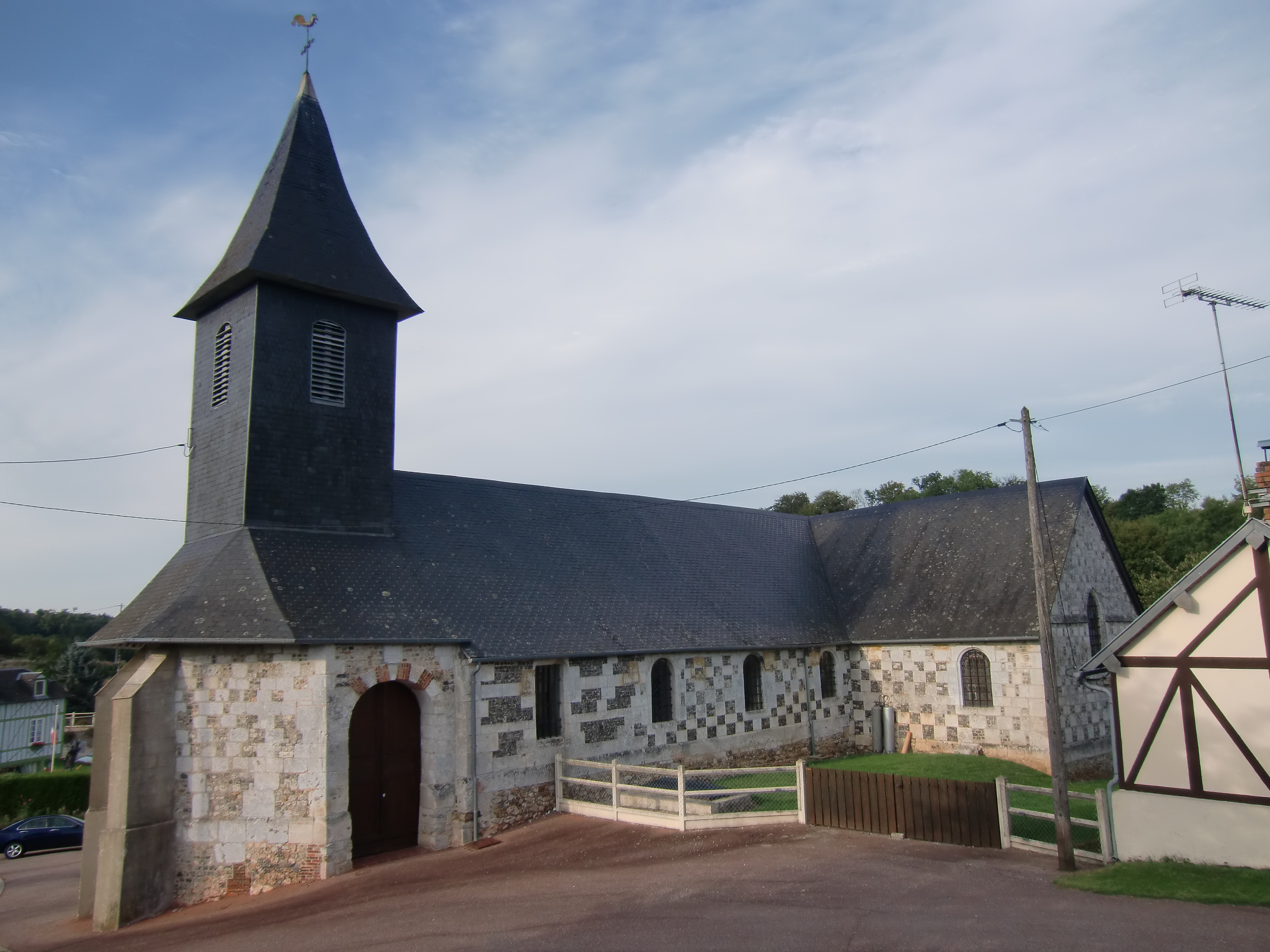 église de Saint-Christophe-sur-Condé (Eure, Normandie, France)